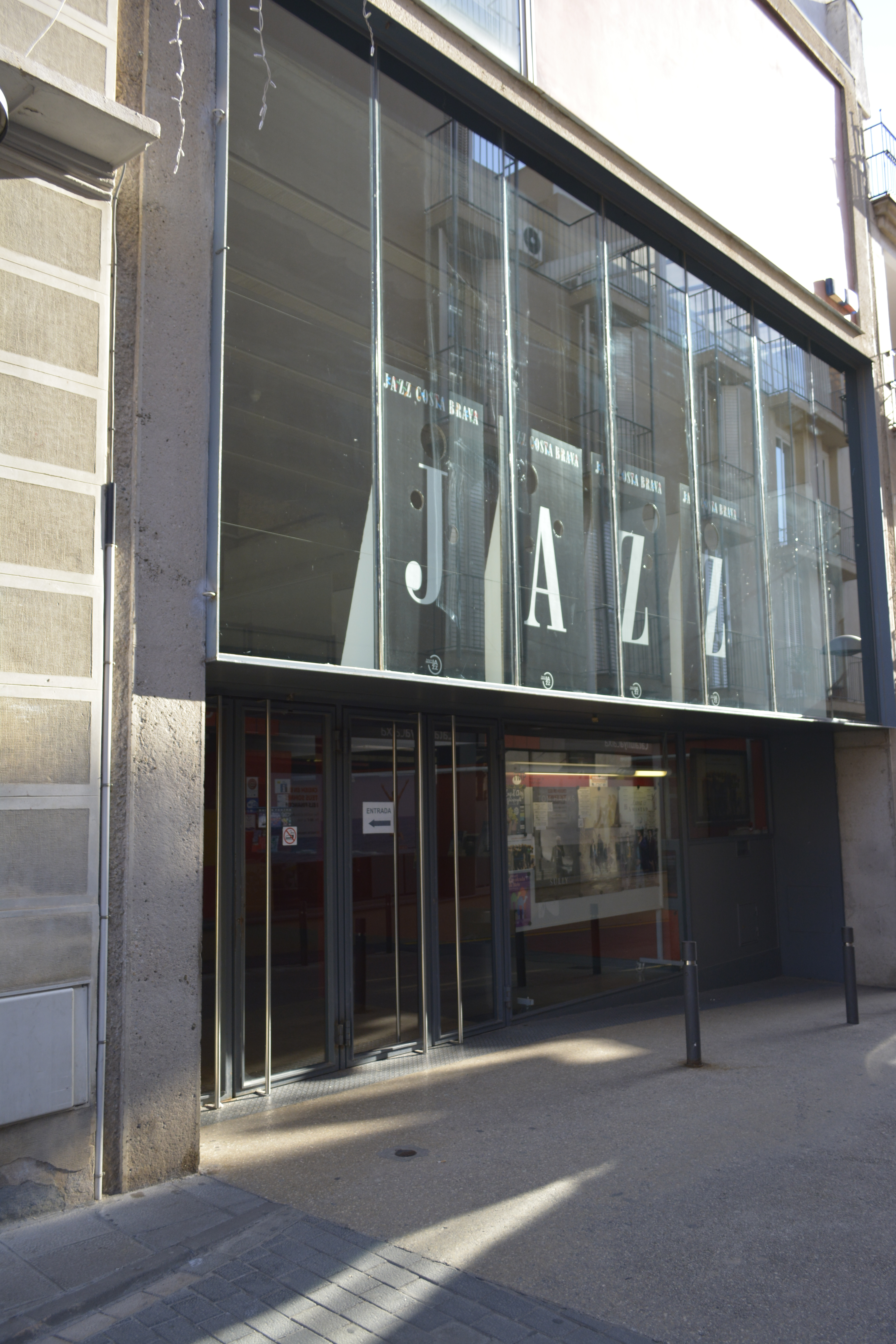 Imatge del cinema Victòria.